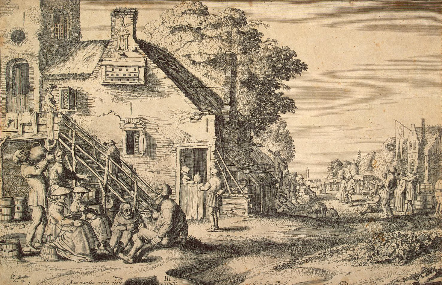 Village Street